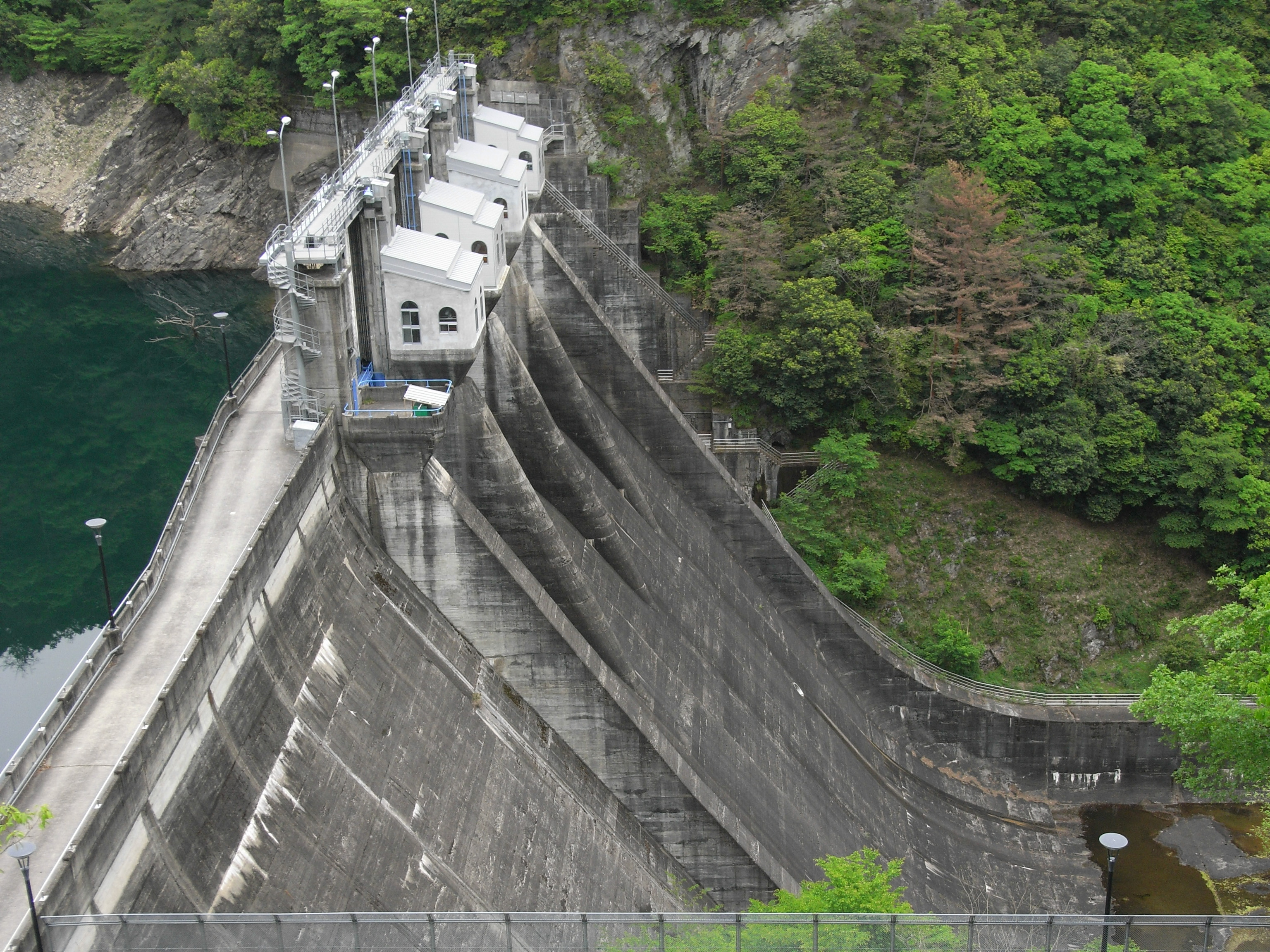 Dam